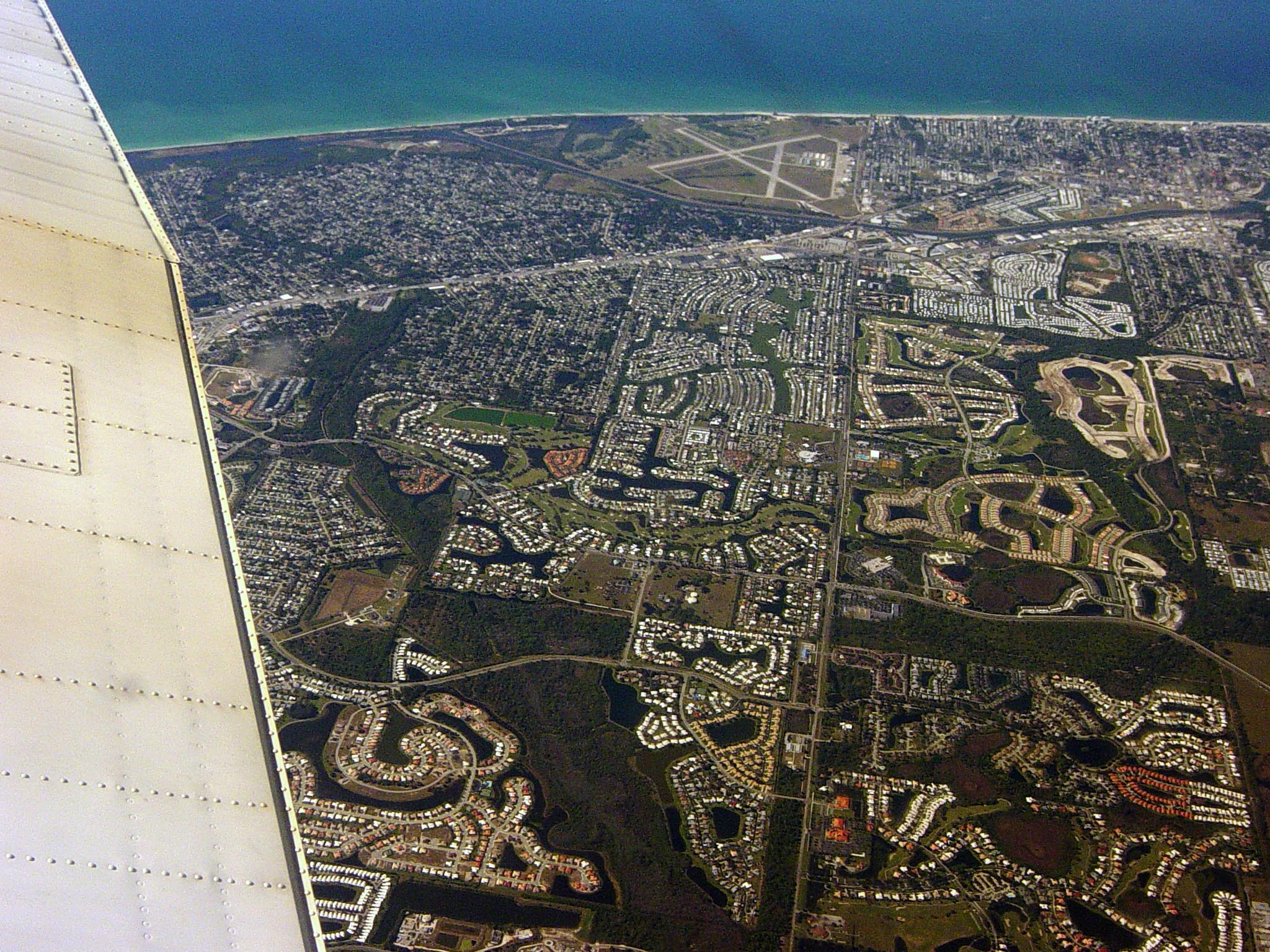 Florida, USA.